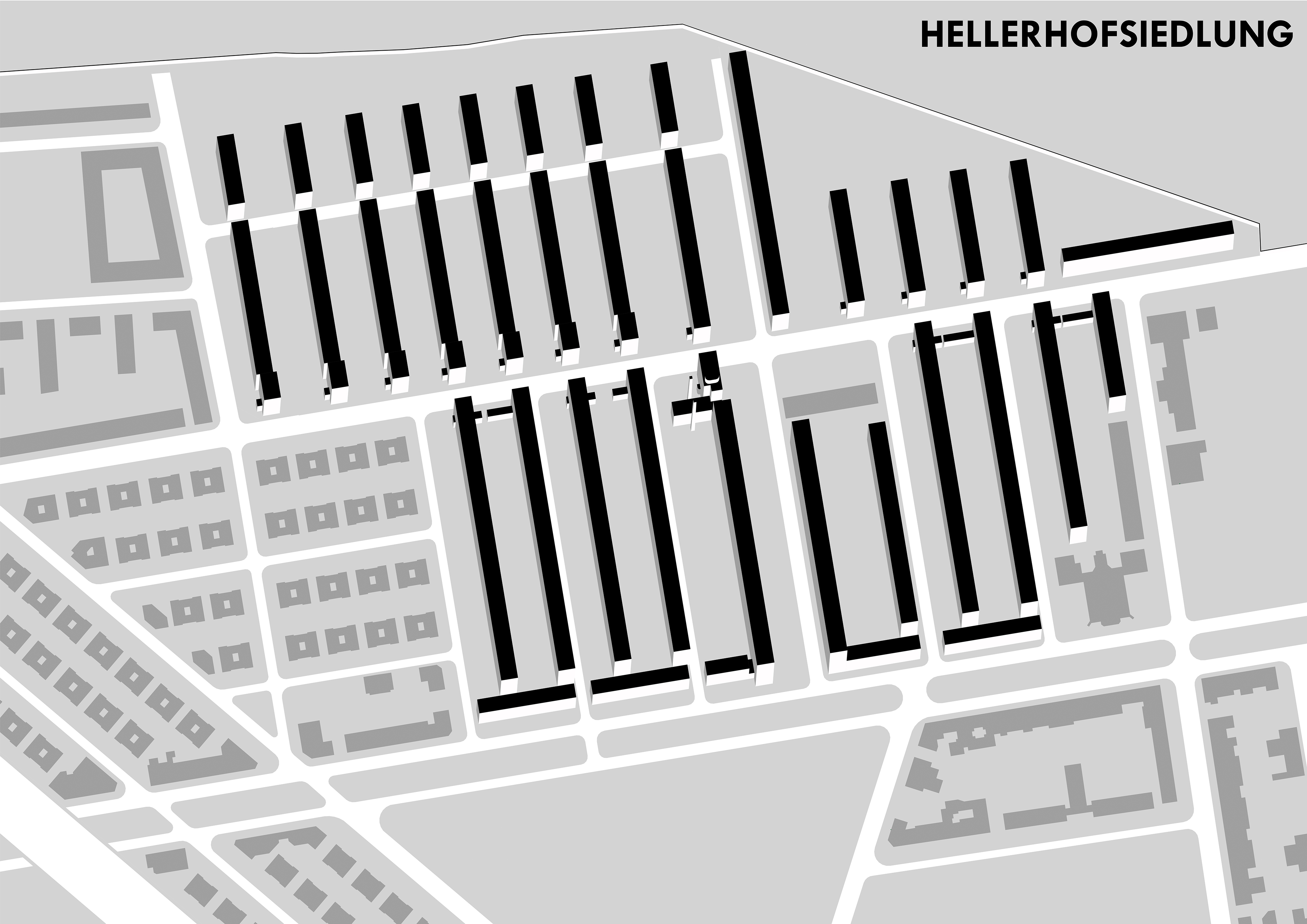 Planungsstand 1931 - Teilt man die Siedlung an der Kreuzung in der Mitte in vier Quadranten, so wurden die Quadranten unten links und rechts und oben rechts so von Mart Stam realisiert. Im linken, oberen Quadrant wurde nur die ersten zwei rechten Zeilen wie abgebildet von Mart Stam gebaut, die restlichen Zeilen wurden nicht wie ursprünglich geplant und abgebildet von Karl Blattner ausgeführt.